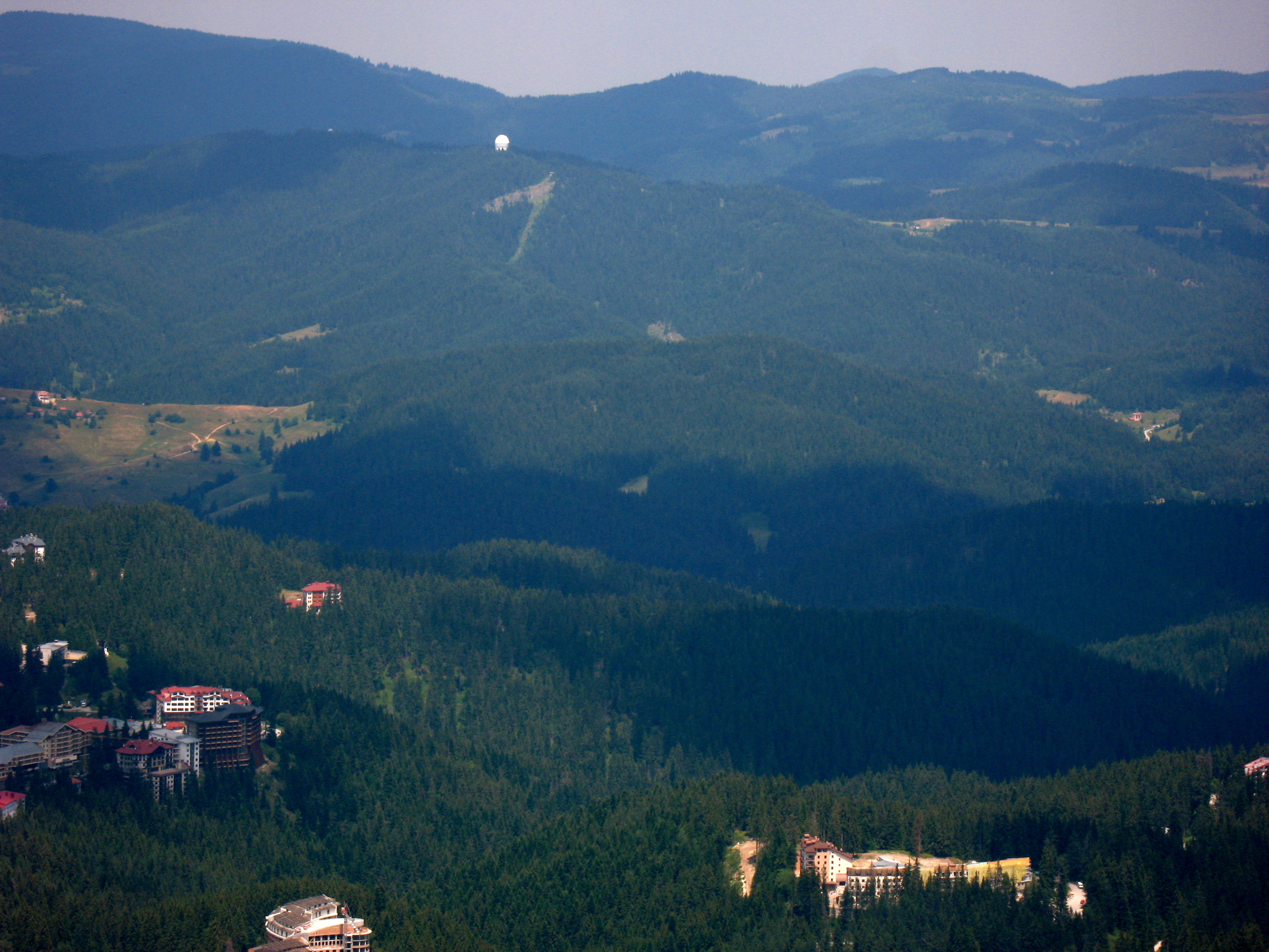 Вижте = Пампорово_1687